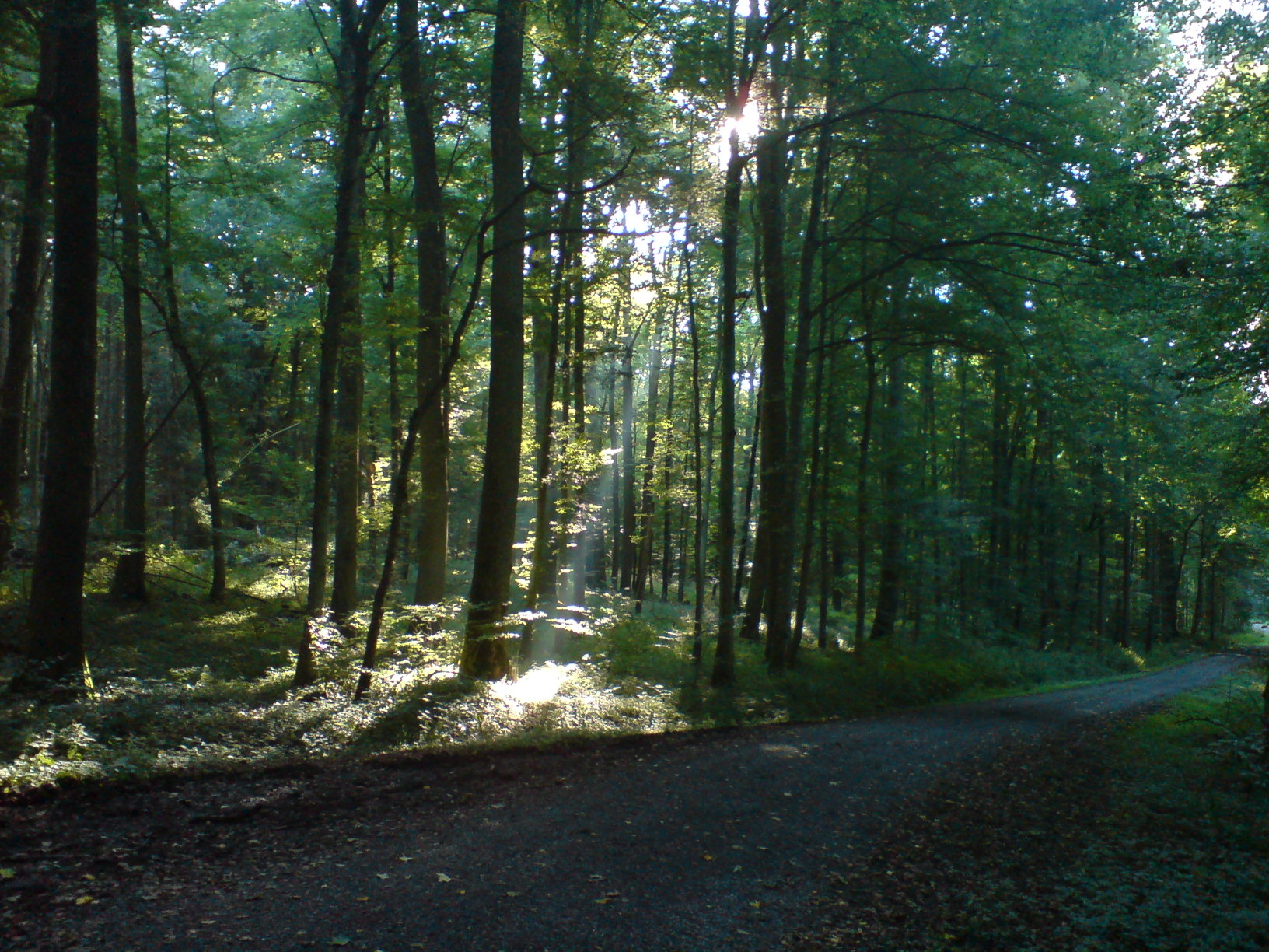 Sonnenstrahlen an einem Septembermorgen im Harthäuser Wald